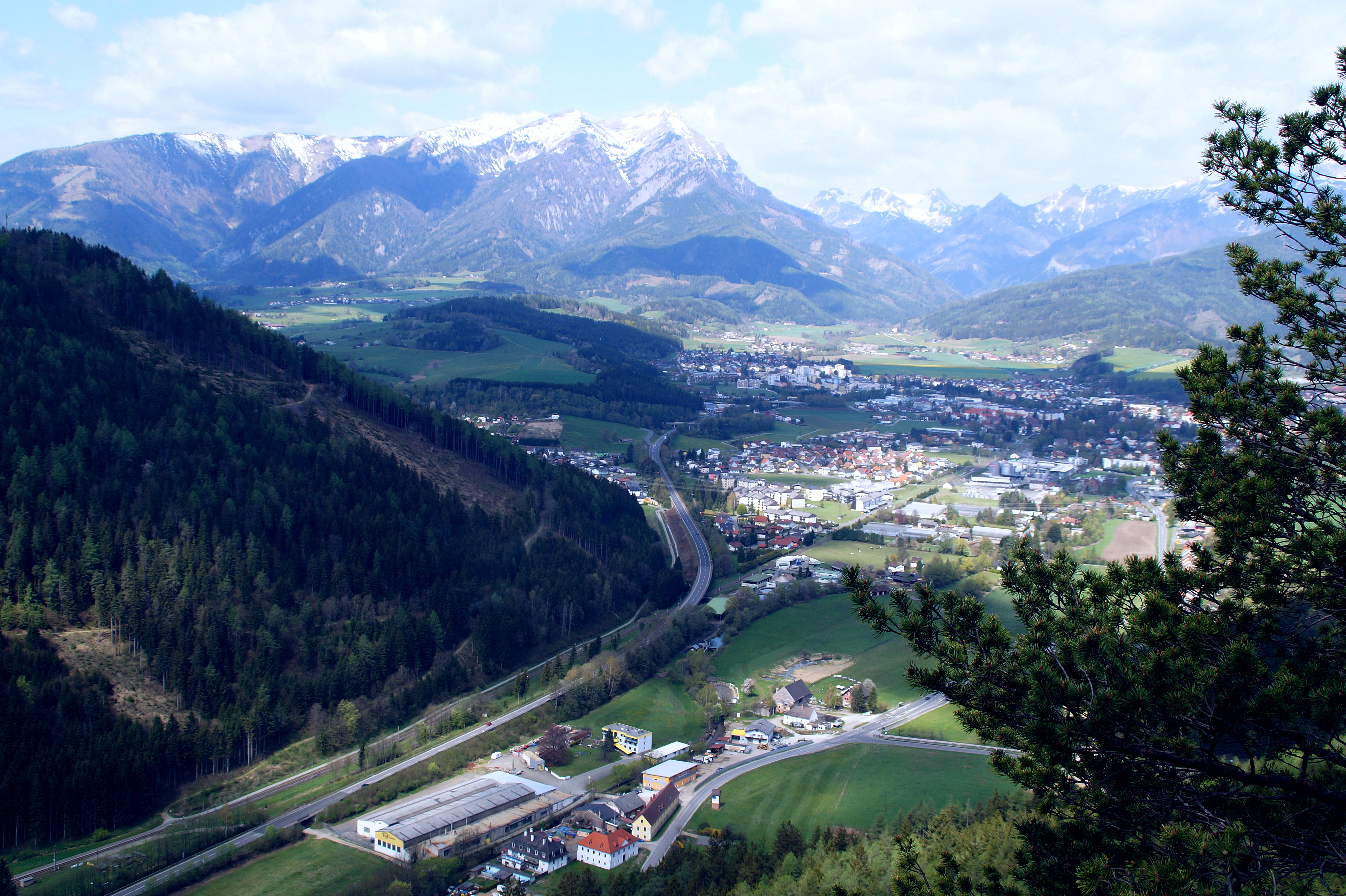 Blick auf Trofaiach von der "Gspitzten Wand". Im Hintergrund Reiting, Gößgraben und Wildfeldgruppe